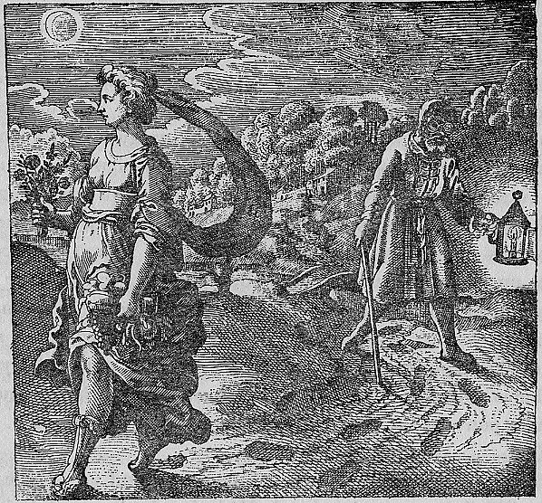 Emblem 42